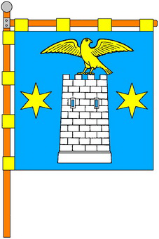 Хоругва села Губків